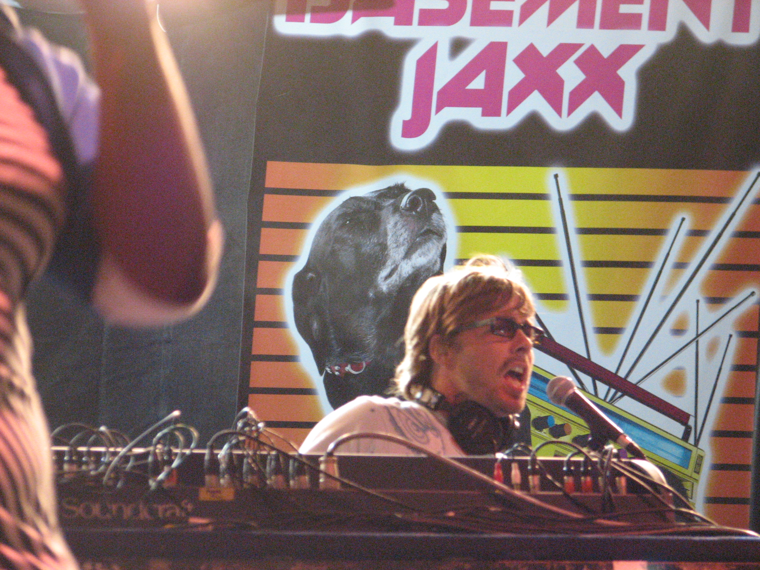 Basement Jaxx on Detour 2006Detour 2006 - Basement Jaxx